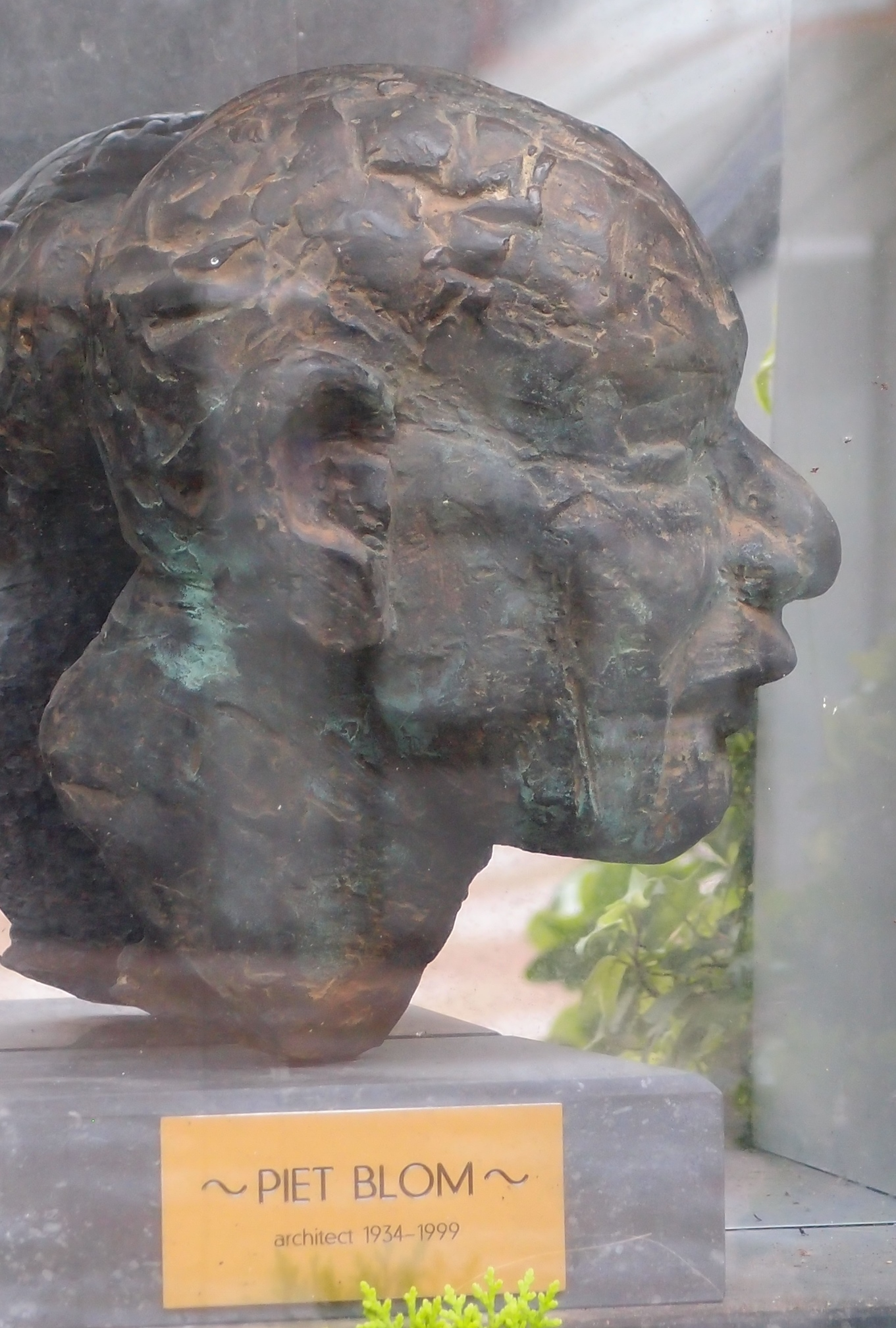 Kopf-Büste des Architekten Piet Blom (1934-1999) an den Kubushäusern in Rotterdam